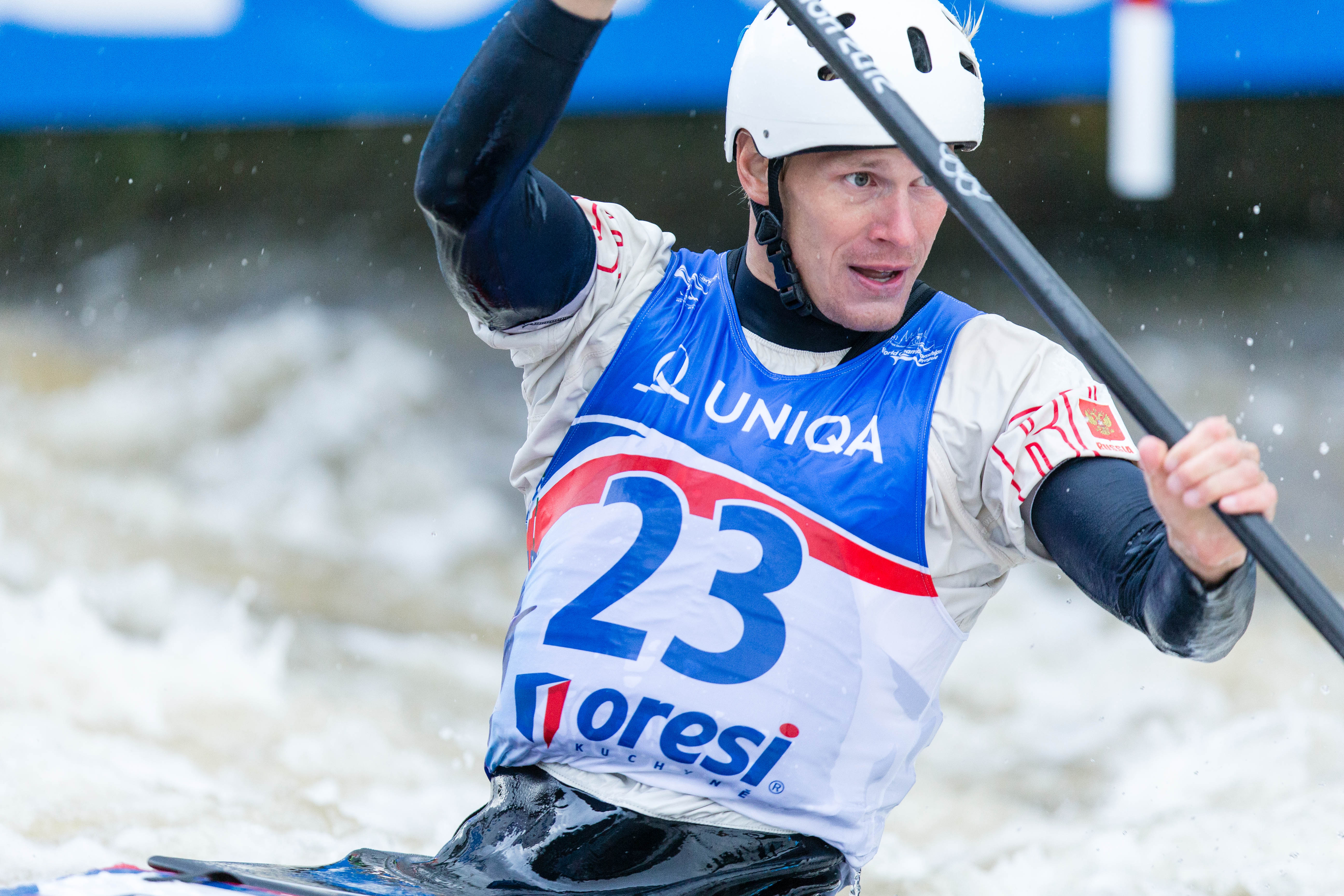 Alexander Lipatov